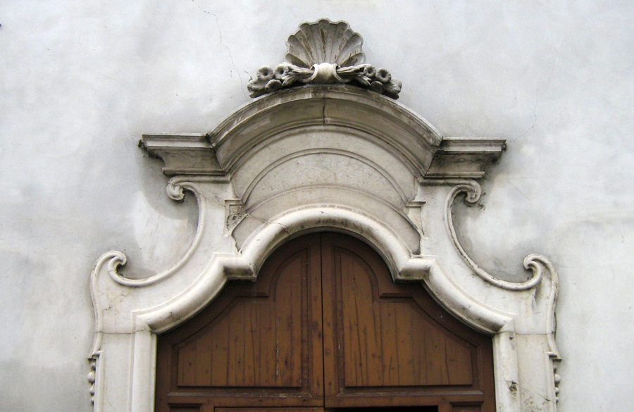 Castel Goffredo, Chiesa di S. Giuseppe, portale barocco.